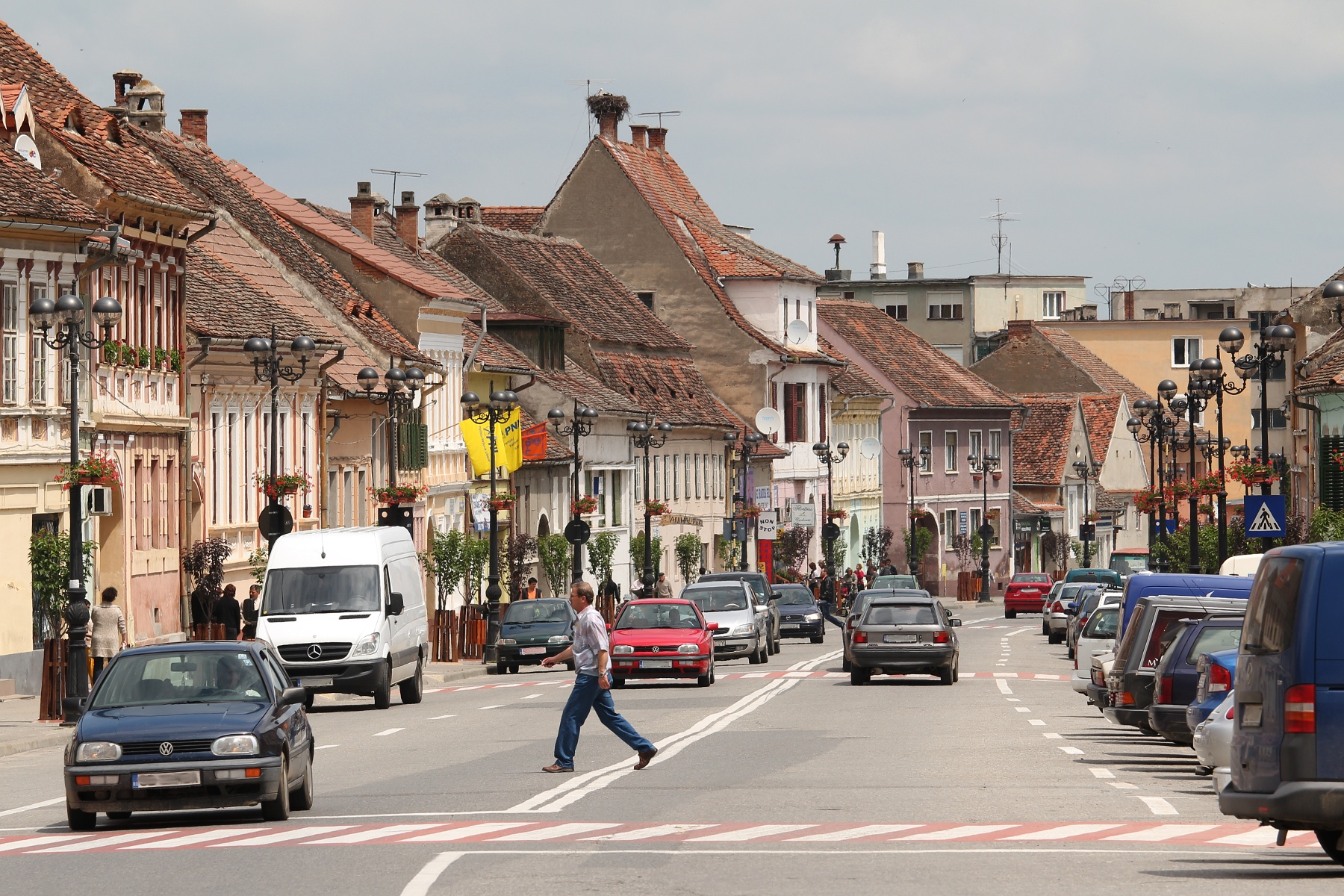 Ansamblul urban "Centrul istoric"